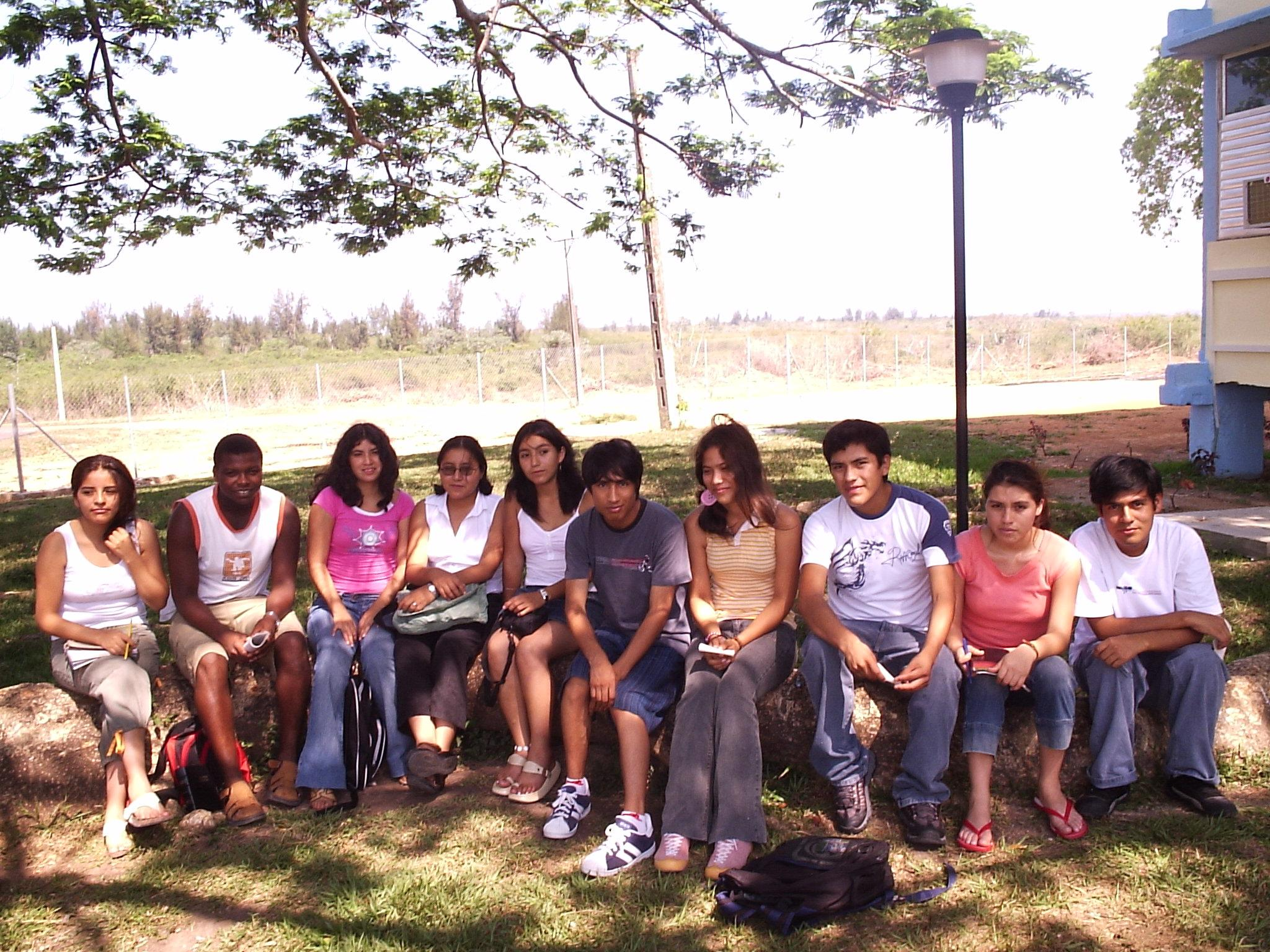 Es una reunión al aire libre de chiscos cristianos en la Elam 26, limitados por el bloqueo que hay en Cuba.